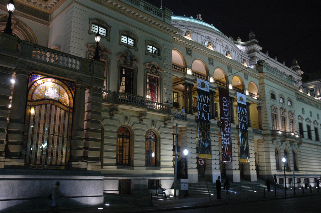 Teatro Municipal de São Paulo, Brasil.